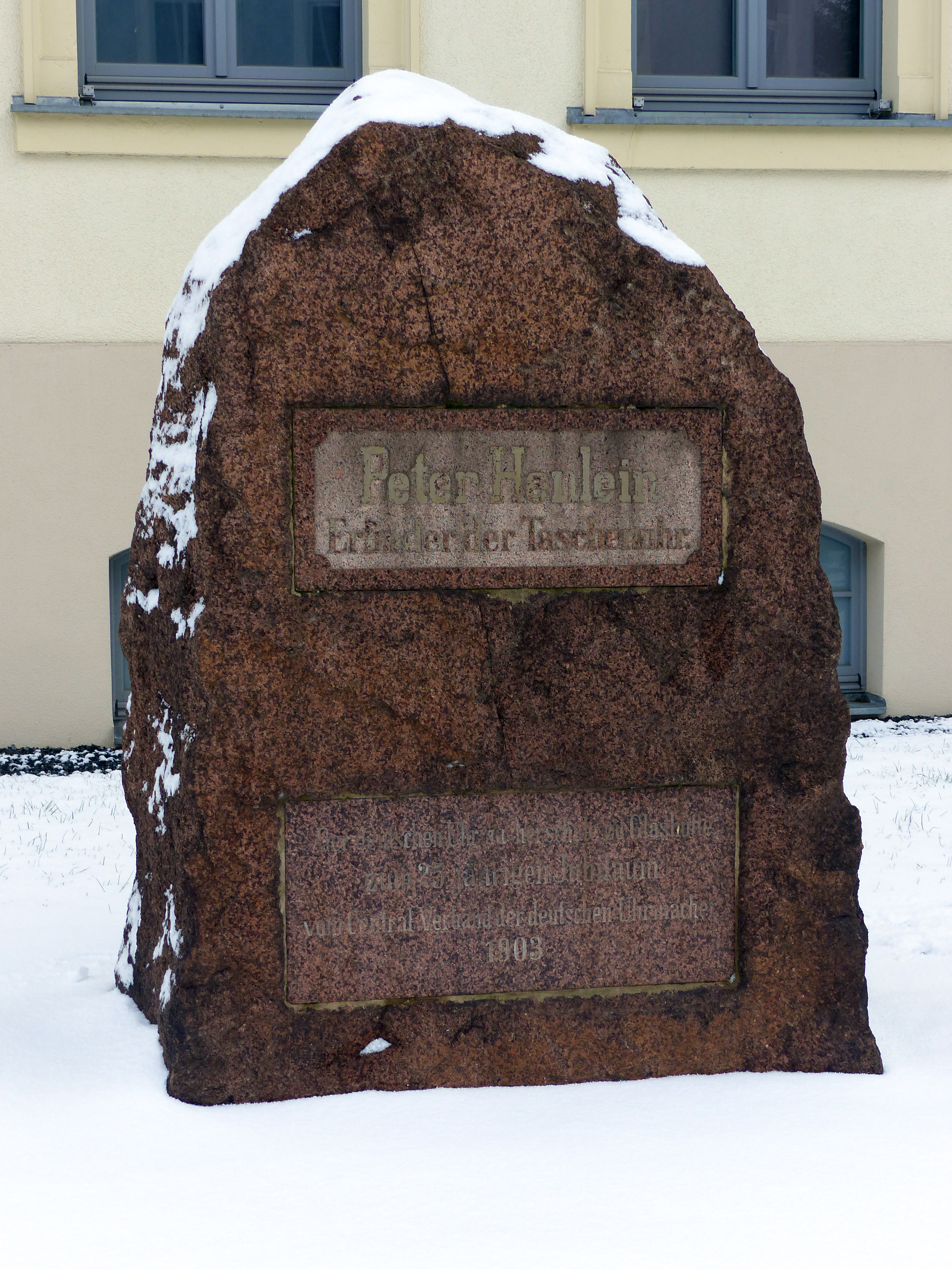 Gedenkstein für Peter Henlein, errichtet anläßlich des 25. Jubiläums der Deutschen Uhrmacherschule in Glashütte im Jahre 1903 durch den Central Verband der deutschen Uhrmacher